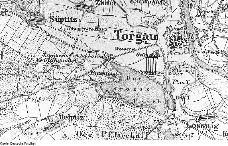 Original image description from the Deutsche FotothekTorgau. Topographische Karte vom Preußischen Staate, Blatt 231 Torgau, 1849